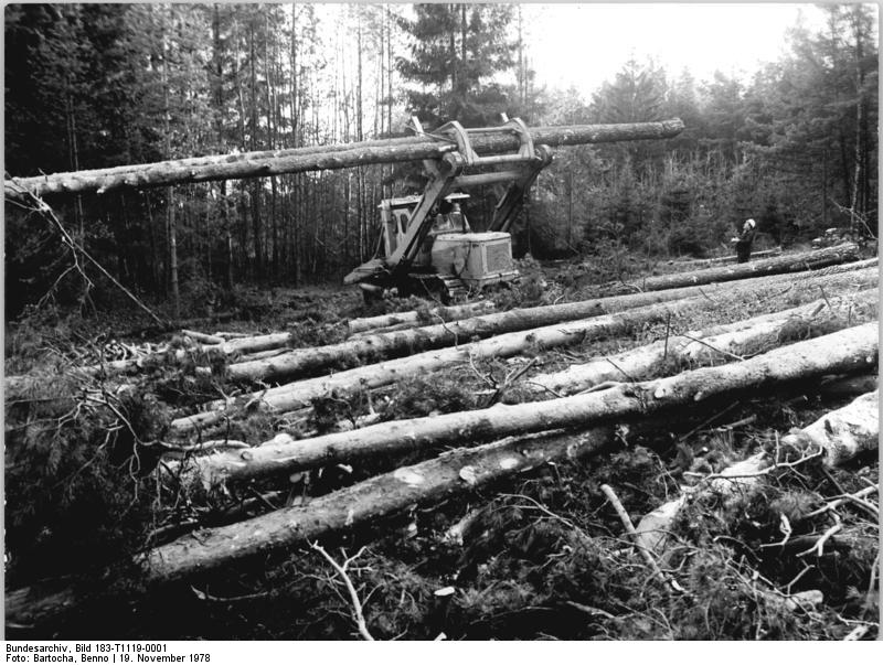 Neustrelitz, Verladen von Holz ADN-ZB Bartocha 19.11.78-b Bez. Neubrandenburg: Leistungsfähige sowjetische Technik in der Forstwirtschaft. In der Forstwirtschaft der DDR kommt in zunehmendem Maße vom Einschlag bis zur Verarbeitung sowjetische Technik zum Einsatz. Heinz Schmidt vom Forstwirtschaftsbetrieb Neustrelitz z.B. steuert seit 3 1-2 Jahren einen sowjetischen Überkopflader, über dessen Eigenschaften er sich sehr lobend äußert. Sowohl die Fahrzeugbedienung als auch das Beladen gehen leicht und flüssig vonstatten. Ferner wird das Fahrzeug in hohem Maße Anforderungen des Arbeitsschutzes gerecht.